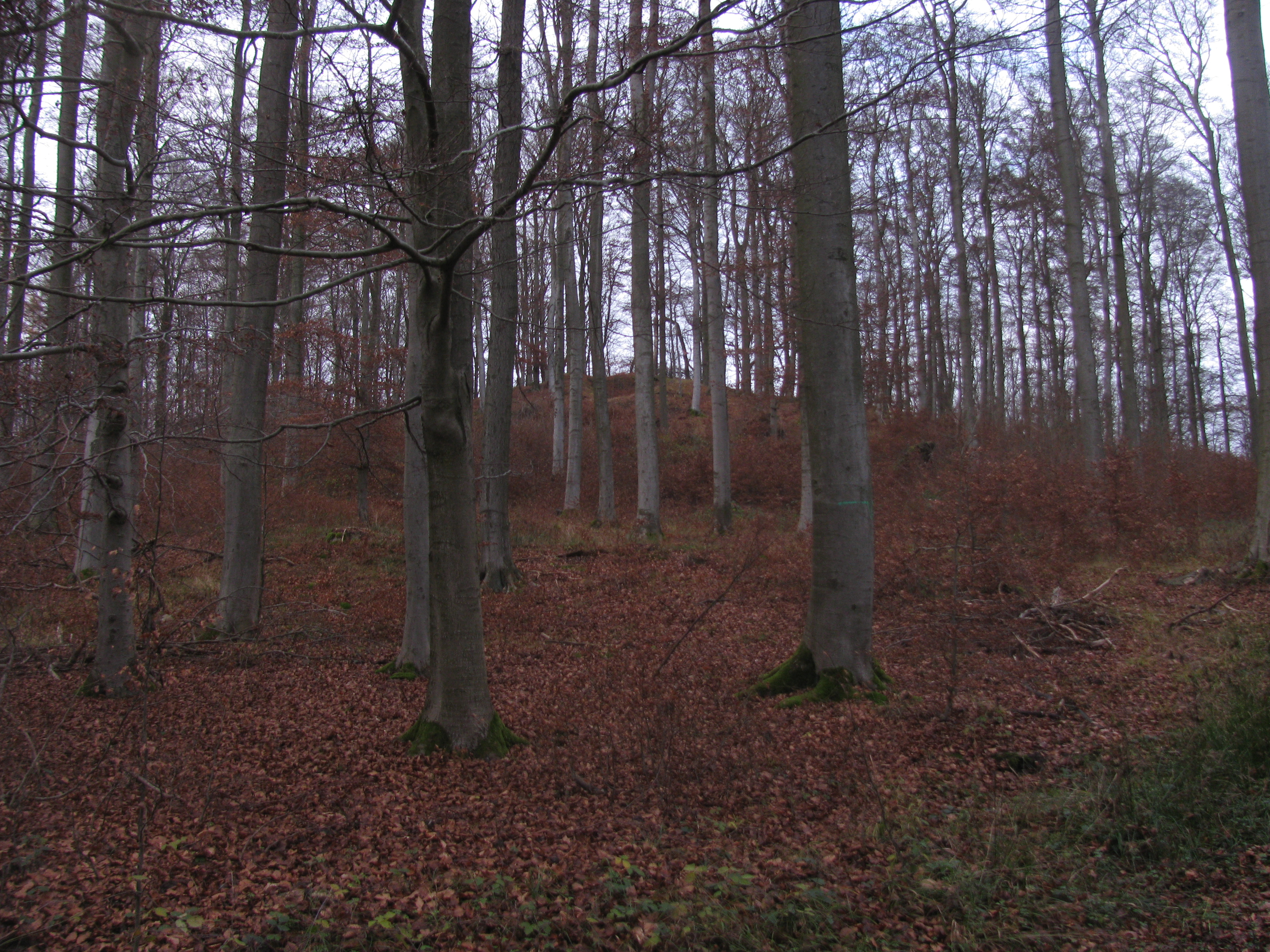 der Gipfel des Hangarstein, unmittelbar dahinter liegt der ehemalige Steinbruch mit dem Hangarsteinsee